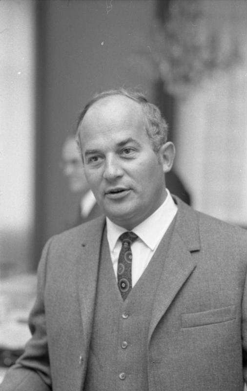 CDU-Vorstandssitzung im BKA [Bundeskanzleramt]